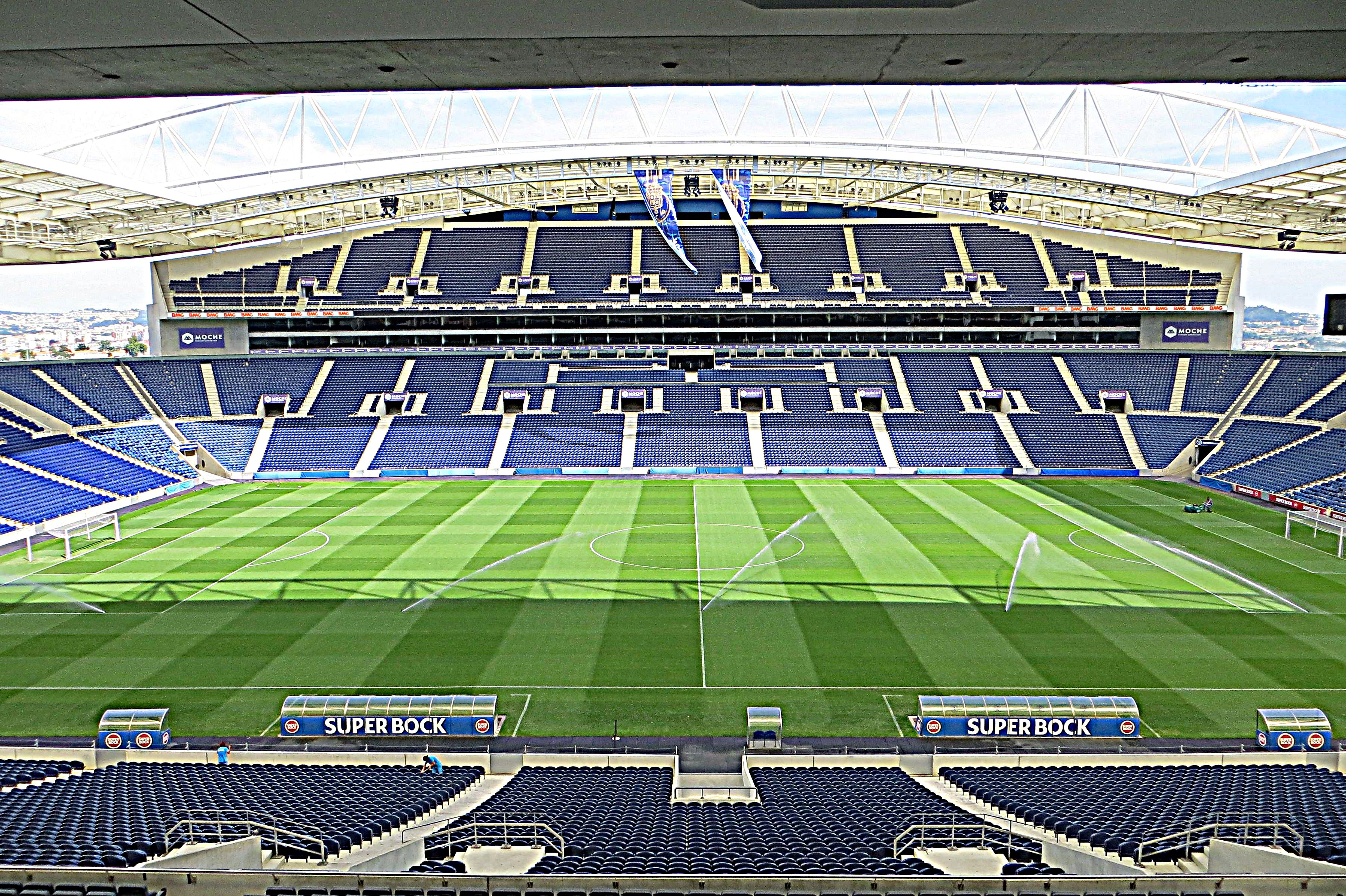 Estadio do Dragao